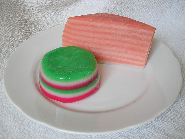 Kue lapis. Indonesian layered 'pie' Location: Netherlands Keywords: Kue lapis, Indonesia, pie, sweet, coconutmilk, tapioca flour nl: Kwee lapis (ook: kue lapis) - Indonesische lekkernij Locatie: Nederland Trefwoorden: Kue lapis, Kue lapis, Indonesië, taart, koek, pudding, cocosmelk, santen, tapioca meel